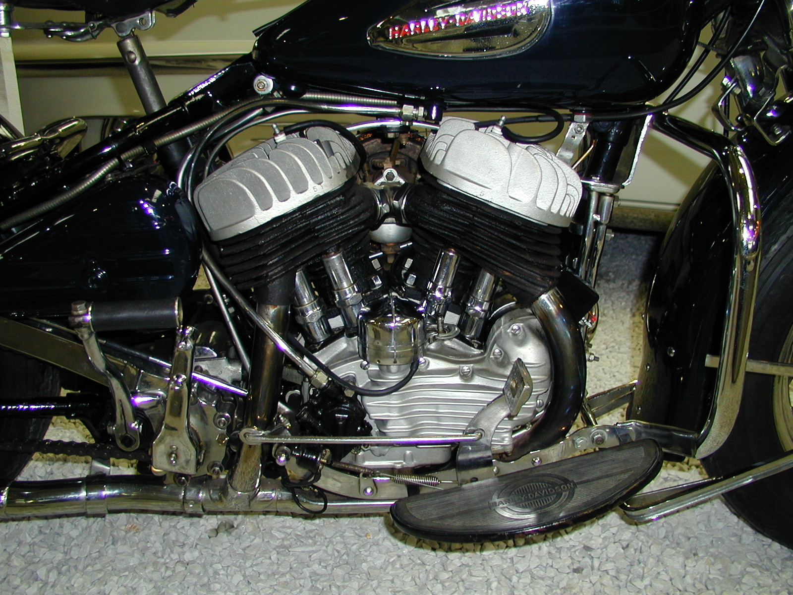 Harley-Davidson Modell Flathead (1929-54)